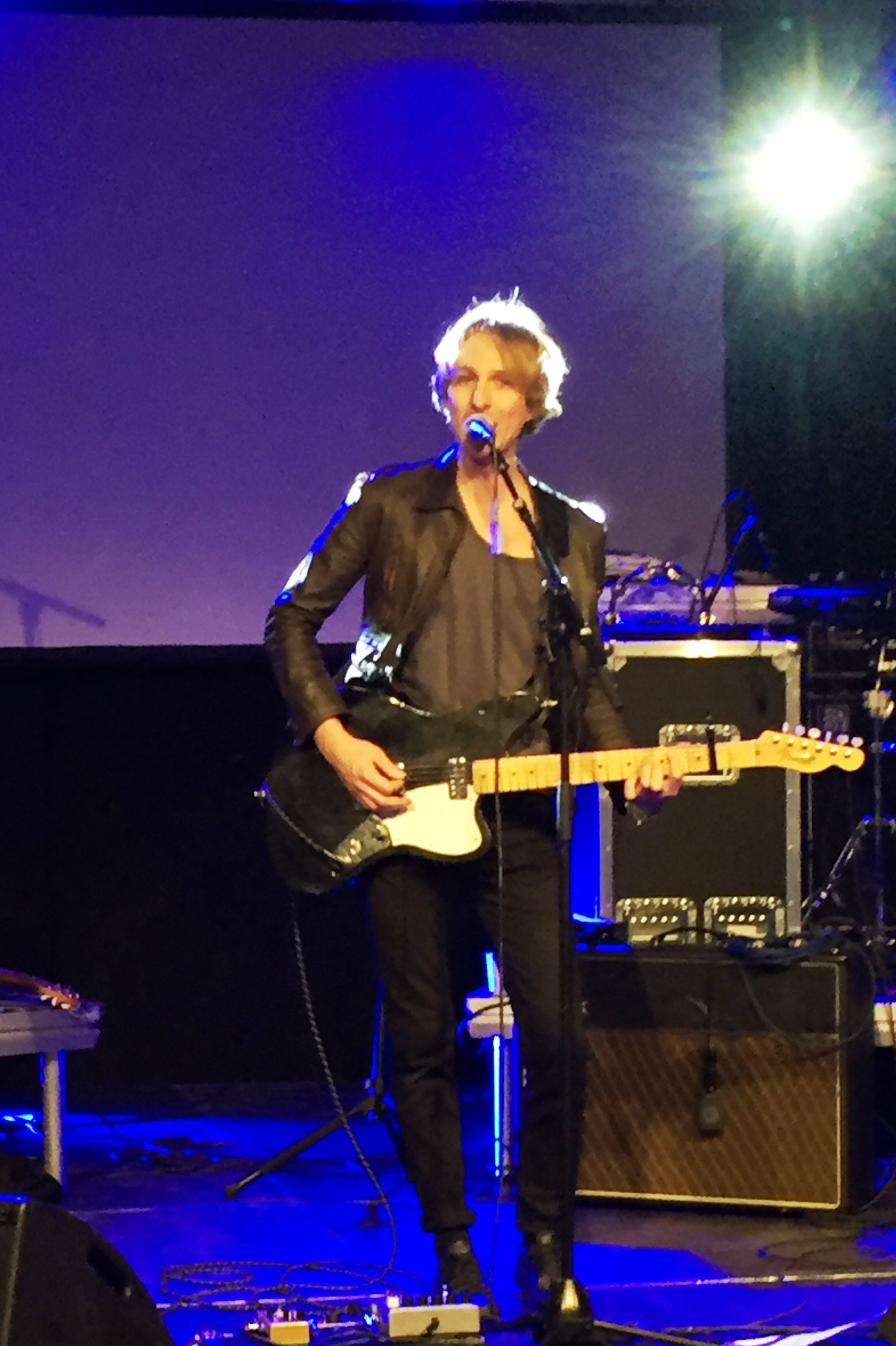 Love Antell uppträder på ETC:s 40-årsjubileum 2016-12-03 i Färgfabriken, Liljeholmen